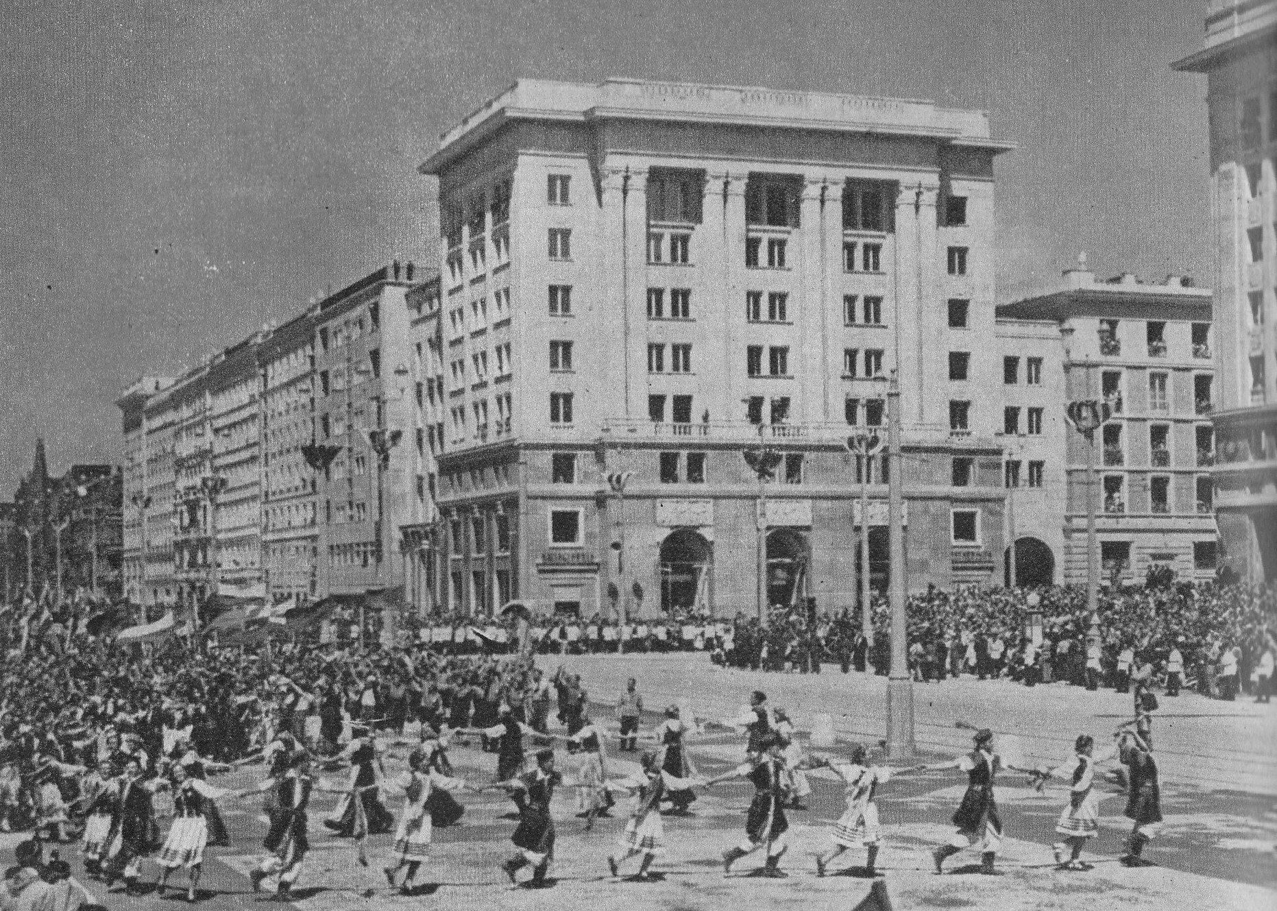 Oddanie do użytku MDM i placu Konstytucji w Warszawie, 22 lipca 1952